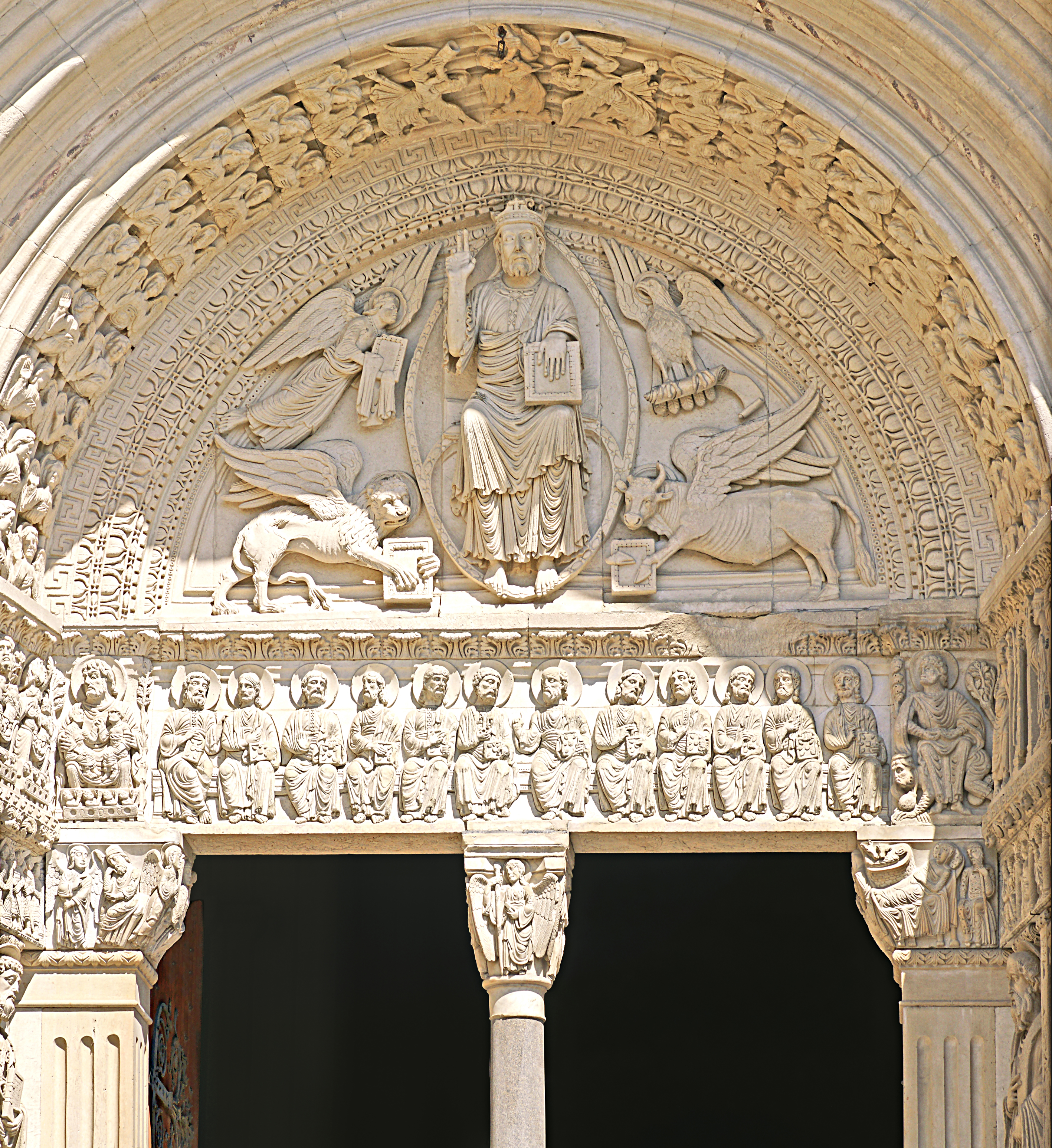 détail: le tympan ( le Christ et les Tétramorphes ), l'archivolte et le Collège des 12 Apôtres